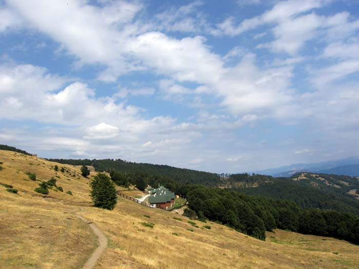 Eko-katuni na Komovima, Crna Gora